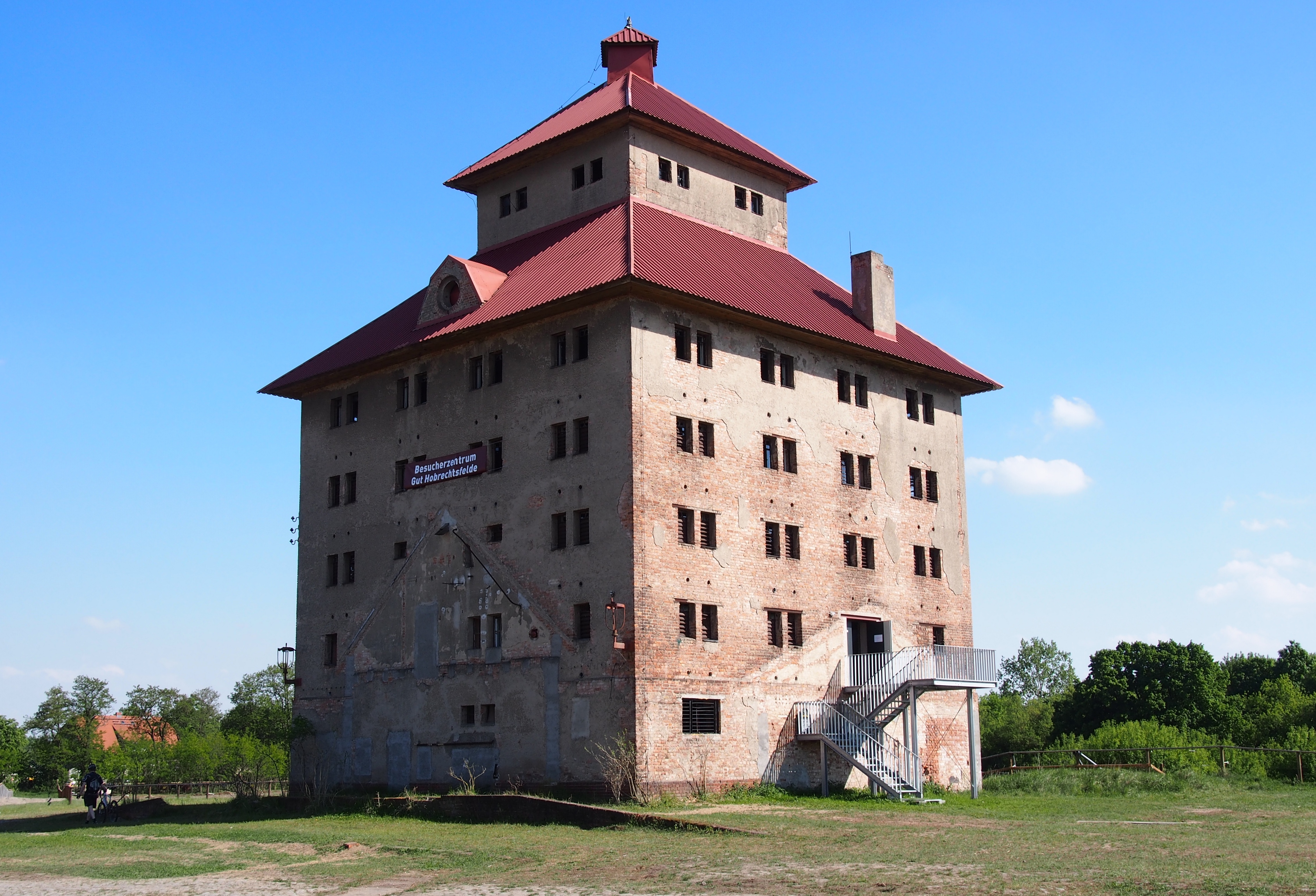 Ehemaliger Kornspeicher des Gutes Hobrechtsfelde in der Gemeinde Panketal in Brandenburg (Deutschland)